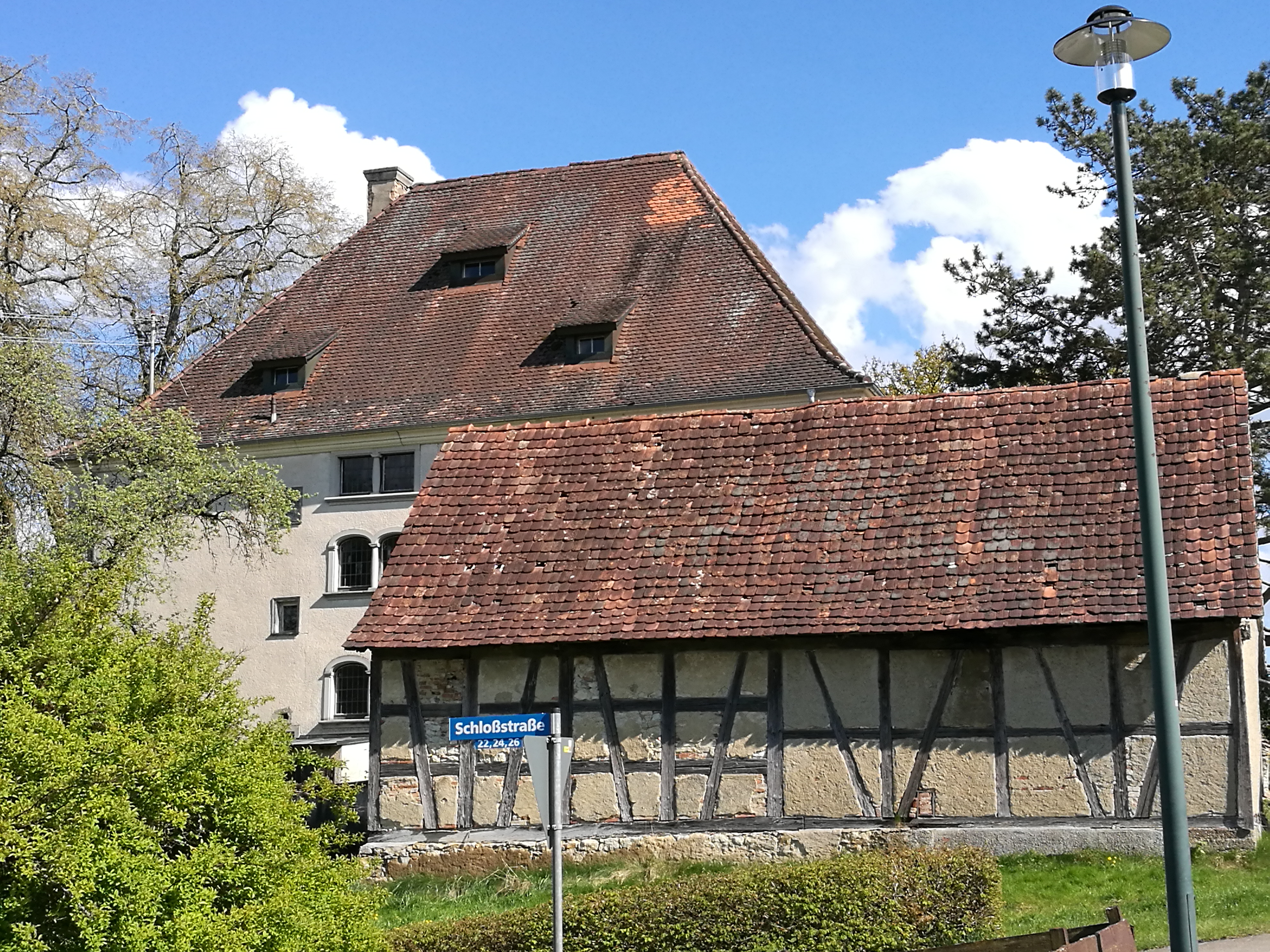 Deutschland (D) - Baden-Württemberg (BW) - Landkreis Konstanz (KN) - Mühlingen: Schloss Mühlingen